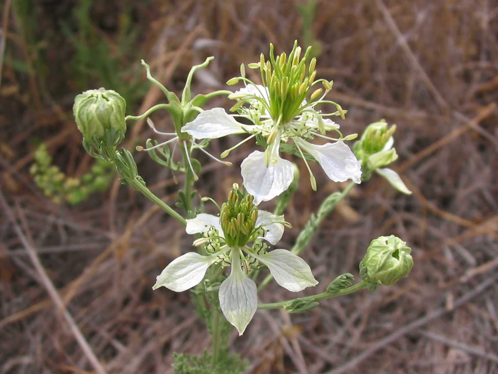 Nigella gallica, syn. Nigella hispanica subsp. gallica